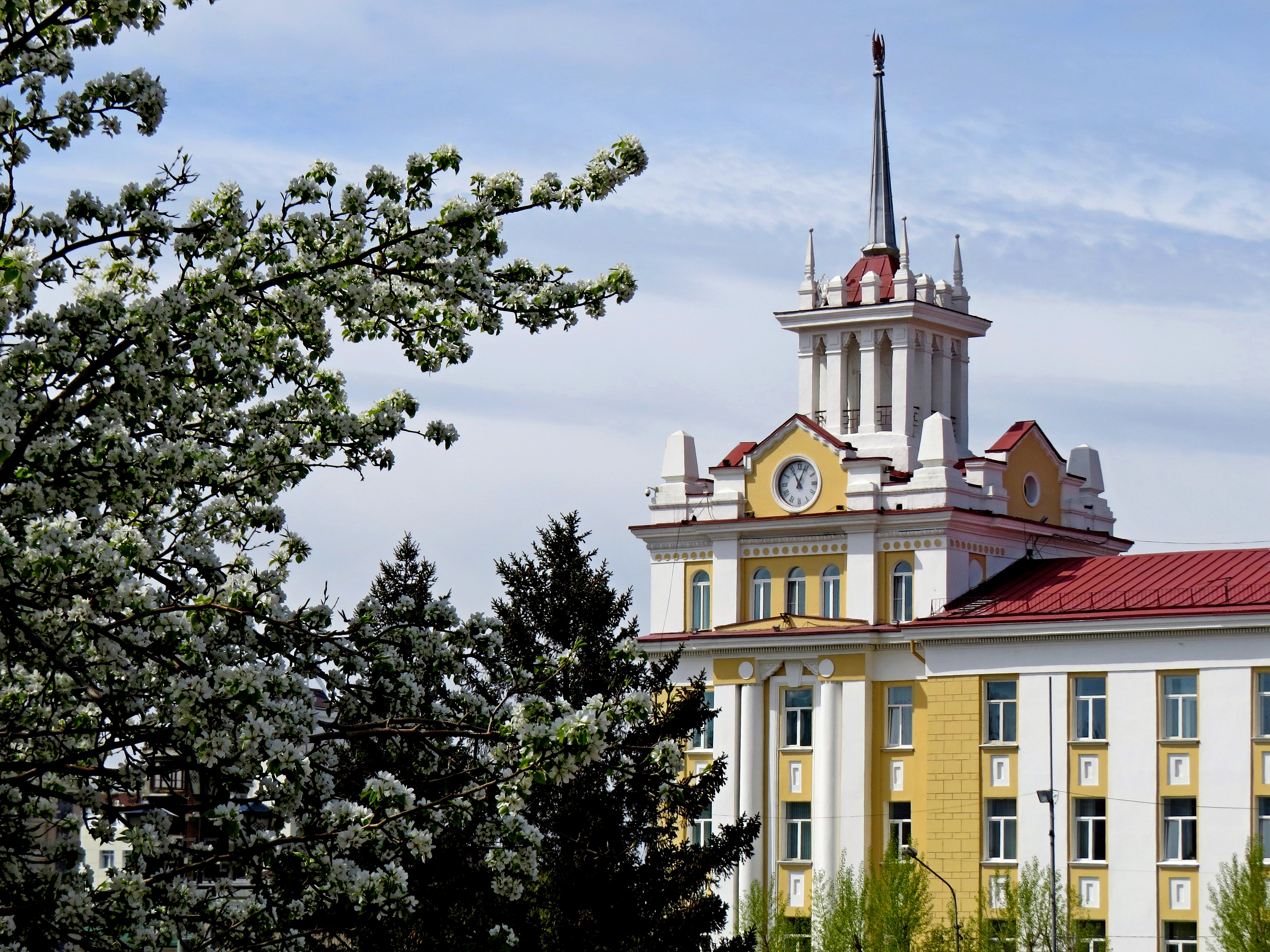 Здание комбината «Забайкаллес» и Бурятского комитета радиовещания: улица Ербанова, 7, Улан-Удэ, Бурятия